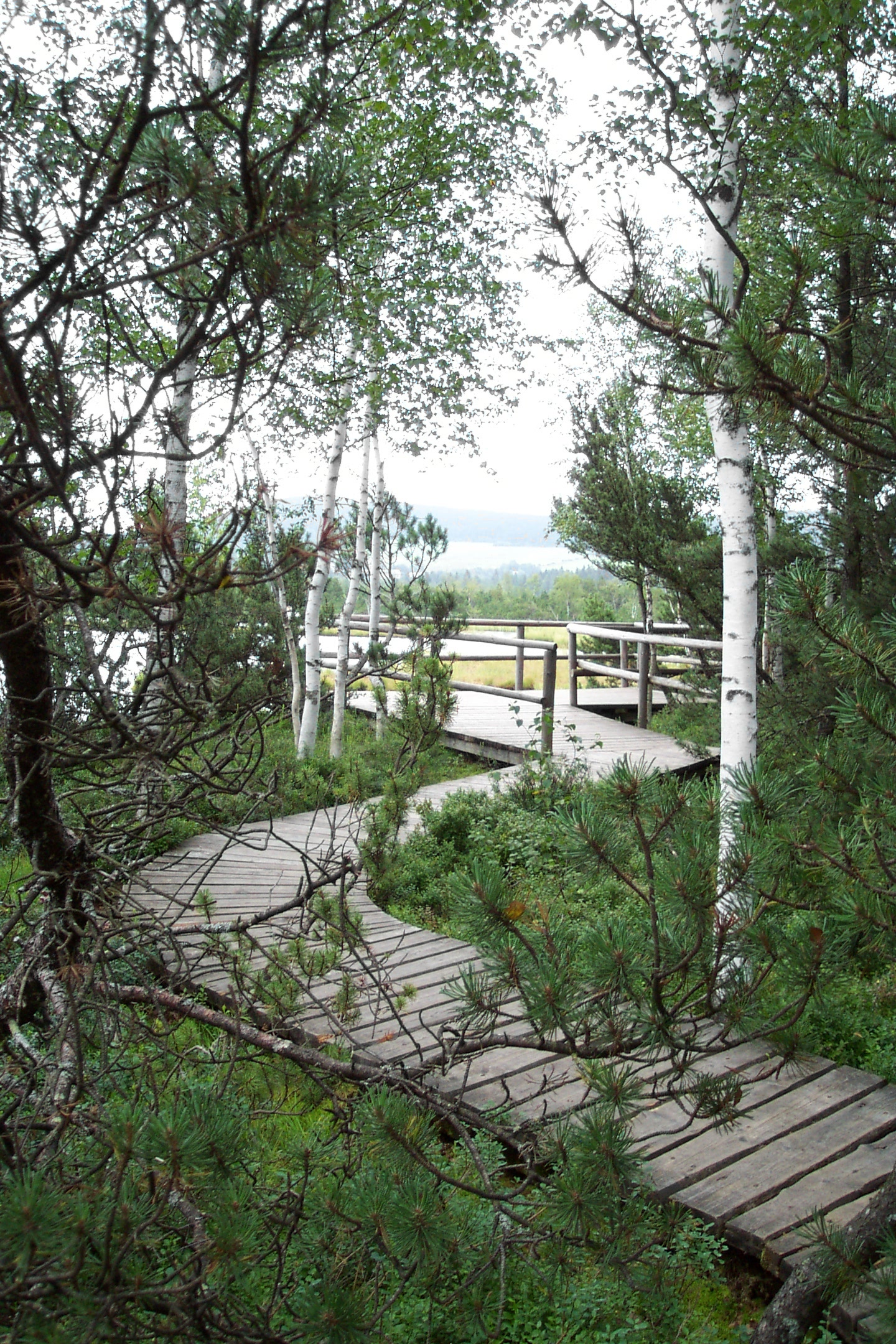 Šumava, Czech republic, Chalupská slať near Borová Lada - Šumava, Chalupská slať nedaleko Borové Lady